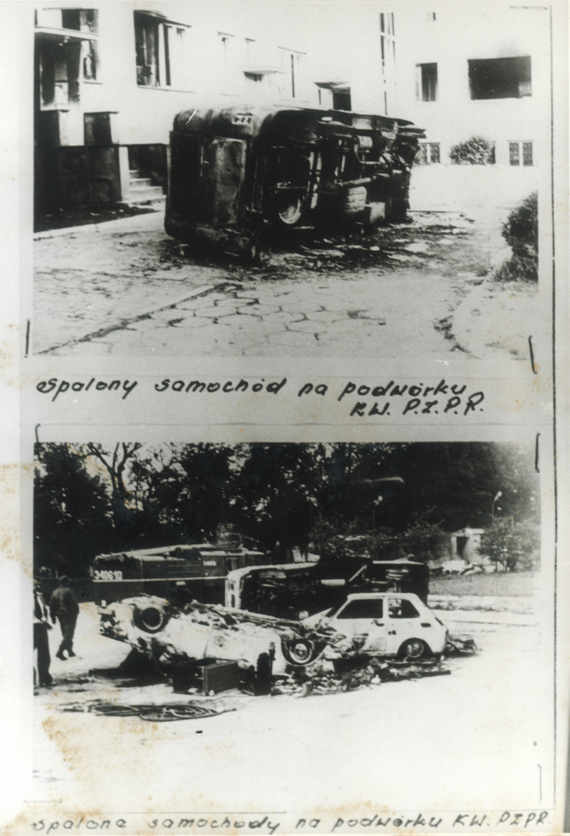 Zdjęcia operacyjne przekazane do Prokuratury Generalnej dokumentujące zniszczenia po wydarzeniach 25 czerwca 1976 roku